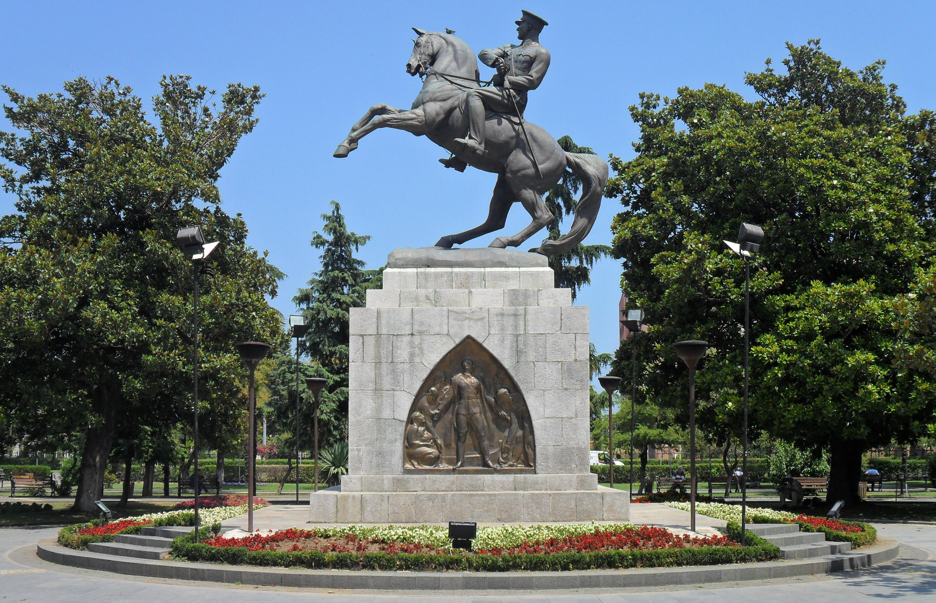 Onur Anıtı'nın profilden görünümü.